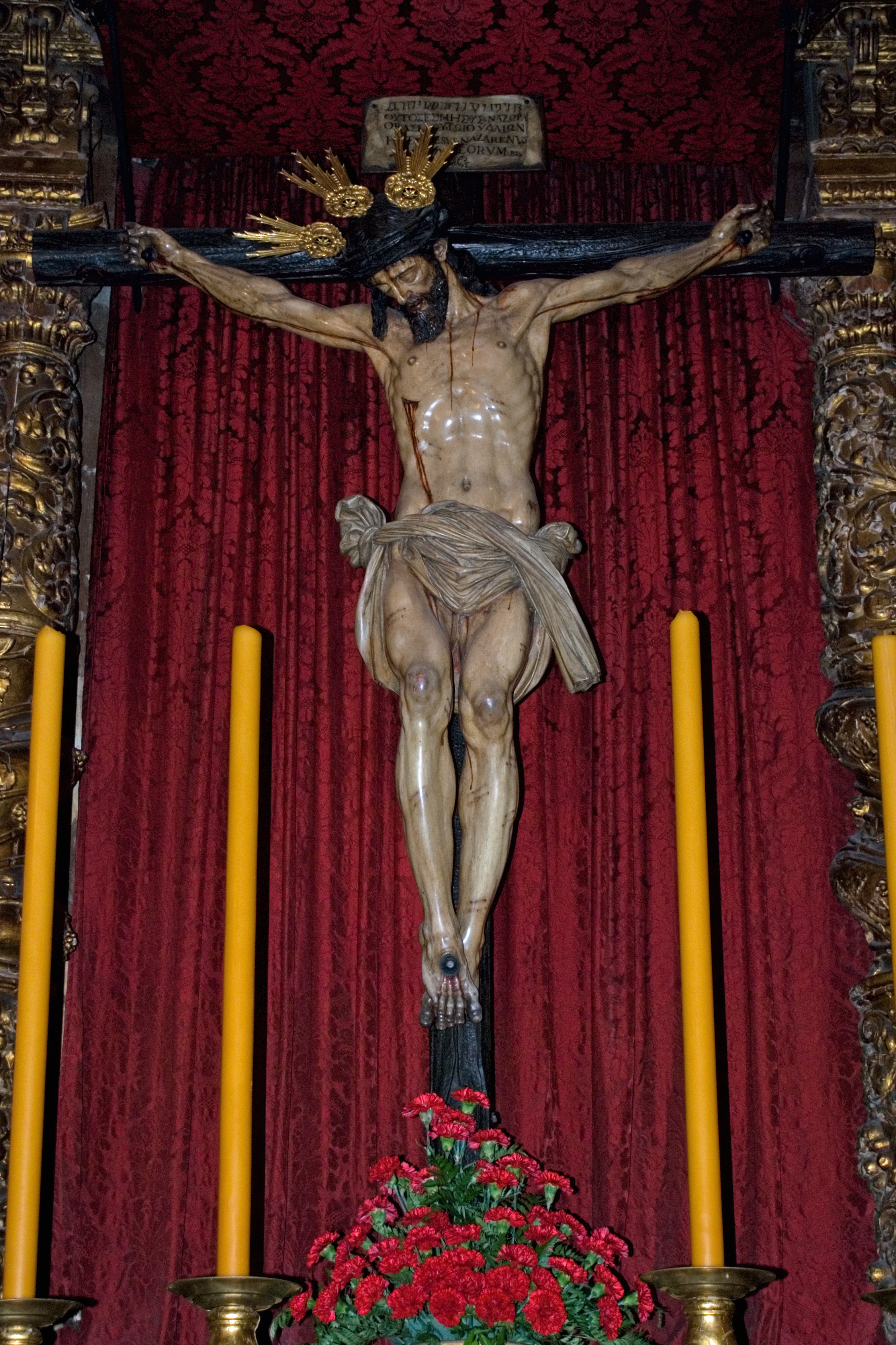 Imagen del Cristo del Calvario, autor Francisco de Ocampo, Iglesia de la Magdalena de Sevilla. Hermandad del Calvario (Semana Santa de Sevilla)